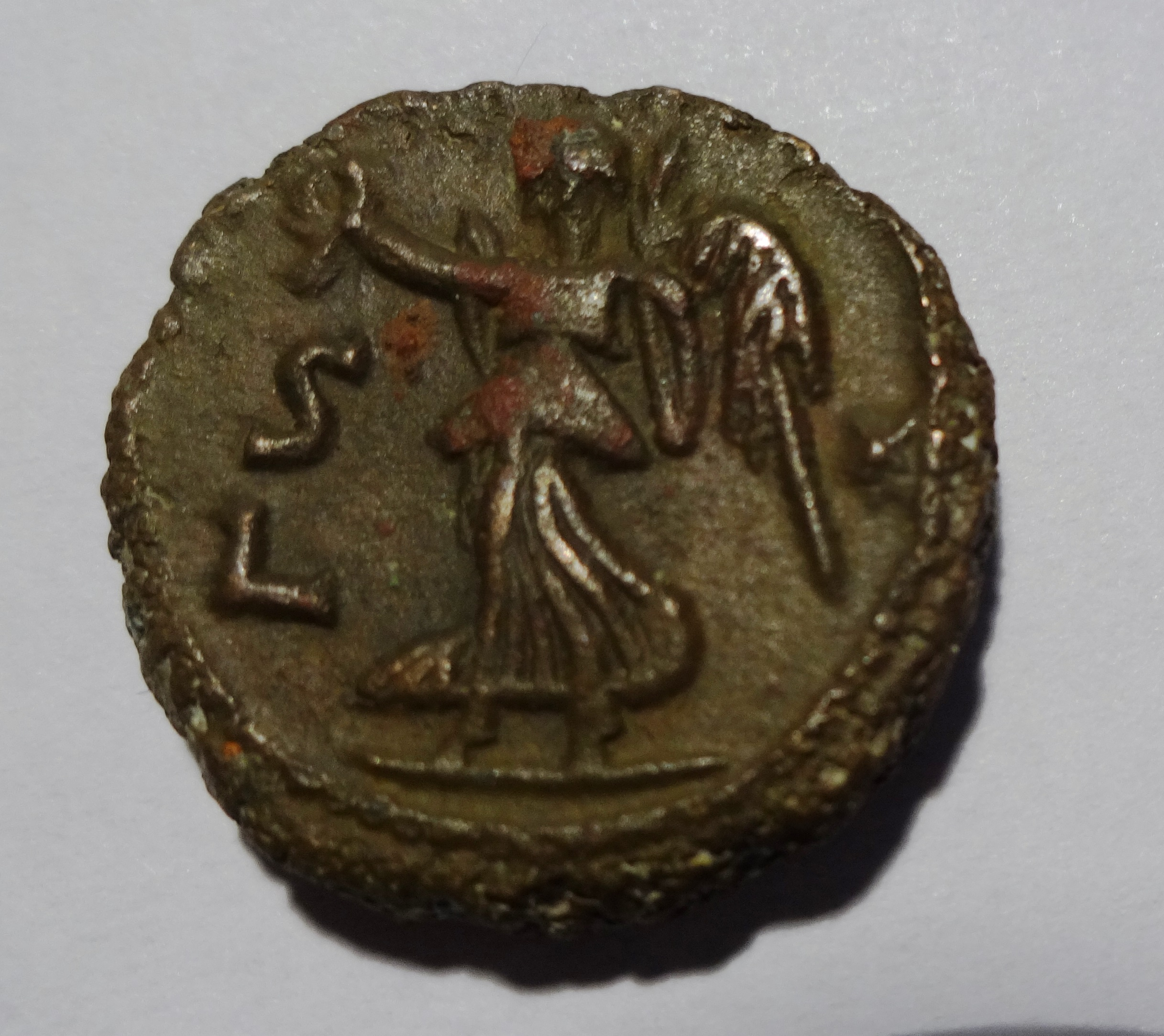 demotisches L für "Jahr" mit griechischer Zahl S für "6" auf Münze aus Alexandria, Kampmann/Ganschow Nr. 120.50